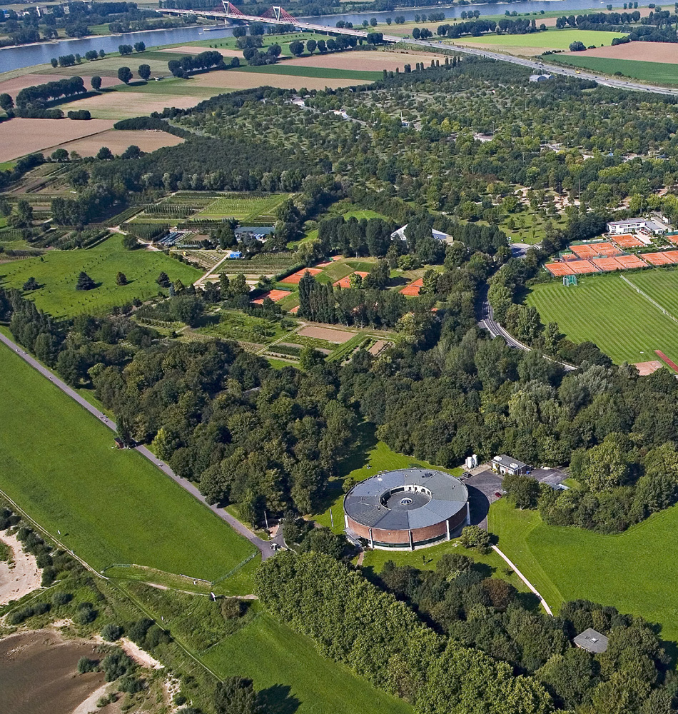 Luftbildaufnahme des Wasserwerks Am Staad, oben die A44-Rheinbrücke; Düsseldorf